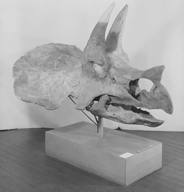 Schedel van een Triceratops brevicorus in het Mineralogisch-Geologisch Museum Delft Triceratops brevicornus, "met de korte hoorn". Het plesiotype van deze soort was YPM 1832, een in 1891 gevonden schedel met onderkaken waaraan het uiteinde van de snuit, de punten van de wenkbrauwhoorns, en de rand van het nekschild ontbreken. In 1956 werd deze schedel door het Mineralogisch-Geologisch Museum van de Technische Hogeschool Delft geruild voor fossielen die Hendrik Albertus Brouwer op Timor had opgegraven. Tijdens het transport naar Nederland raakte het specimen door een storm en het herhaaldelijk laten vallen van de krat zwaar beschadigd. Het werd door Pieter Kruizinga, enigszins fantasierijk, in een jaar tijd gerestaureerd. Toen het museum tussen 2013 en 2015 opgeheven was, ging de schedel over in de collectie van Naturalis voor een moderne reconstructie.